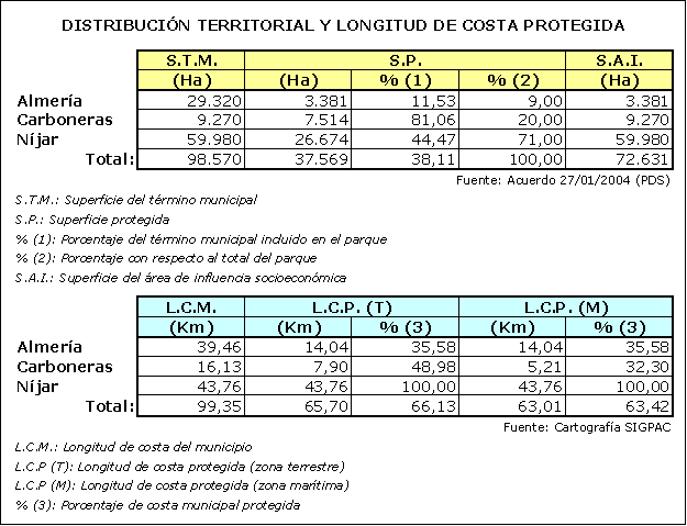 Parque Natural Cabo de Gata-Níjar: Datos territoriales